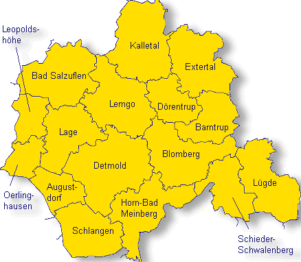 Kommunen des Kreises Lippe Nordrhein-Westfalen, Deutschland.